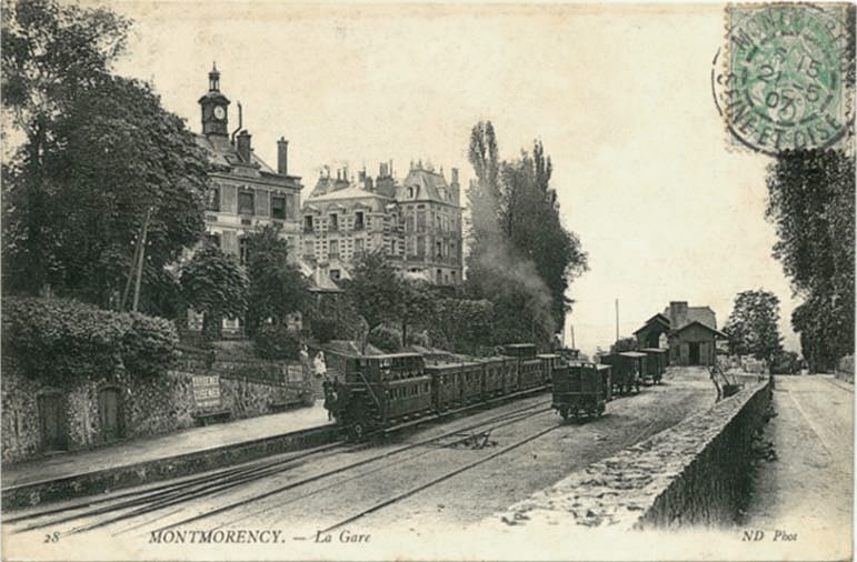 Carte postale ancienne éditée par ND, n°28 :La gare de Montmorency (France) avant 1907.